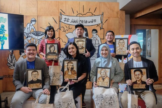 Sesi foto bersama beberapa pembicara dalam Festival Relawan 2019, paling kiri atas merupakan Marsya Nurmaranti, Excecutive Director Indorelawan